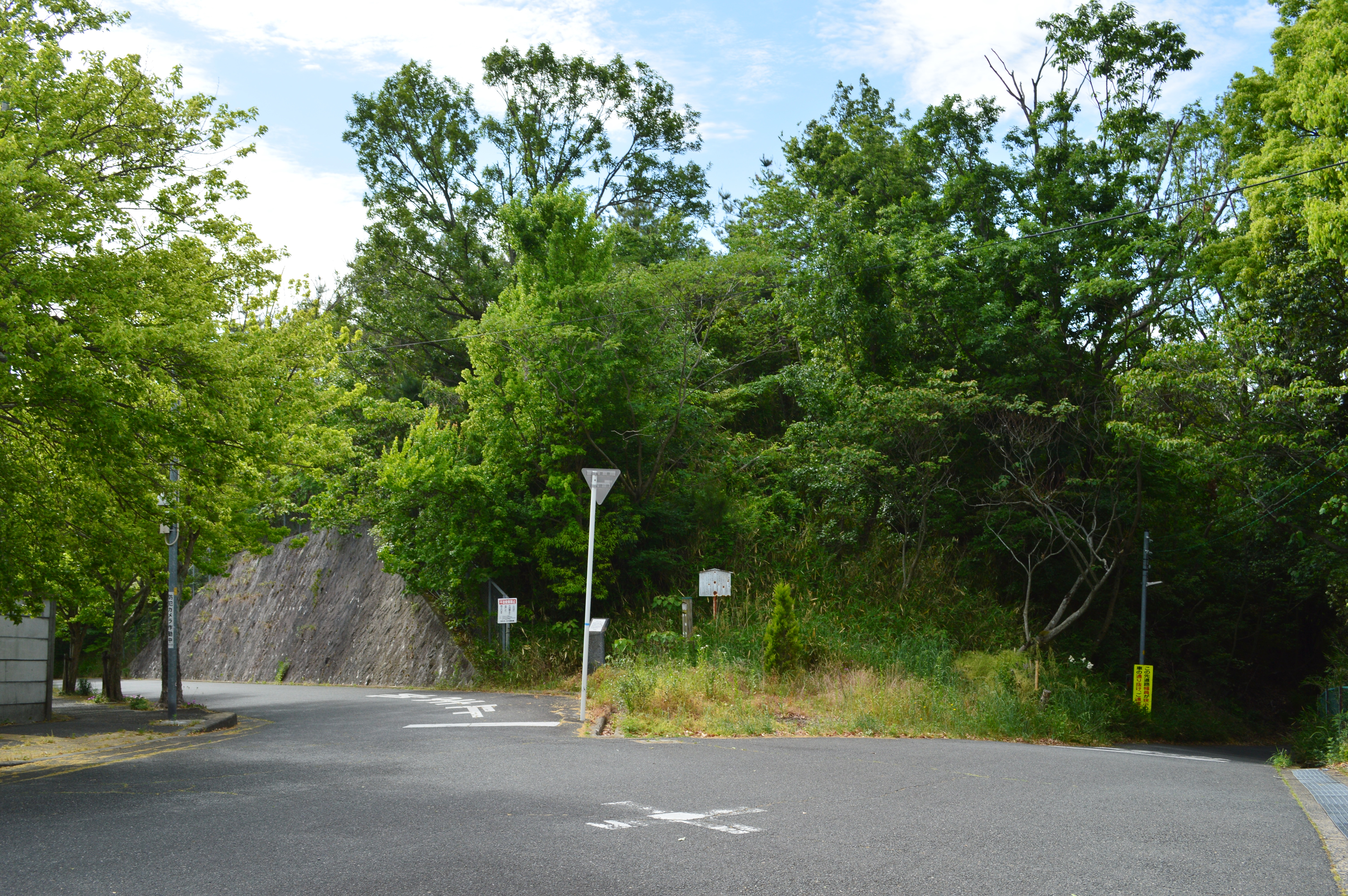 安威0号墳 墳丘遠景